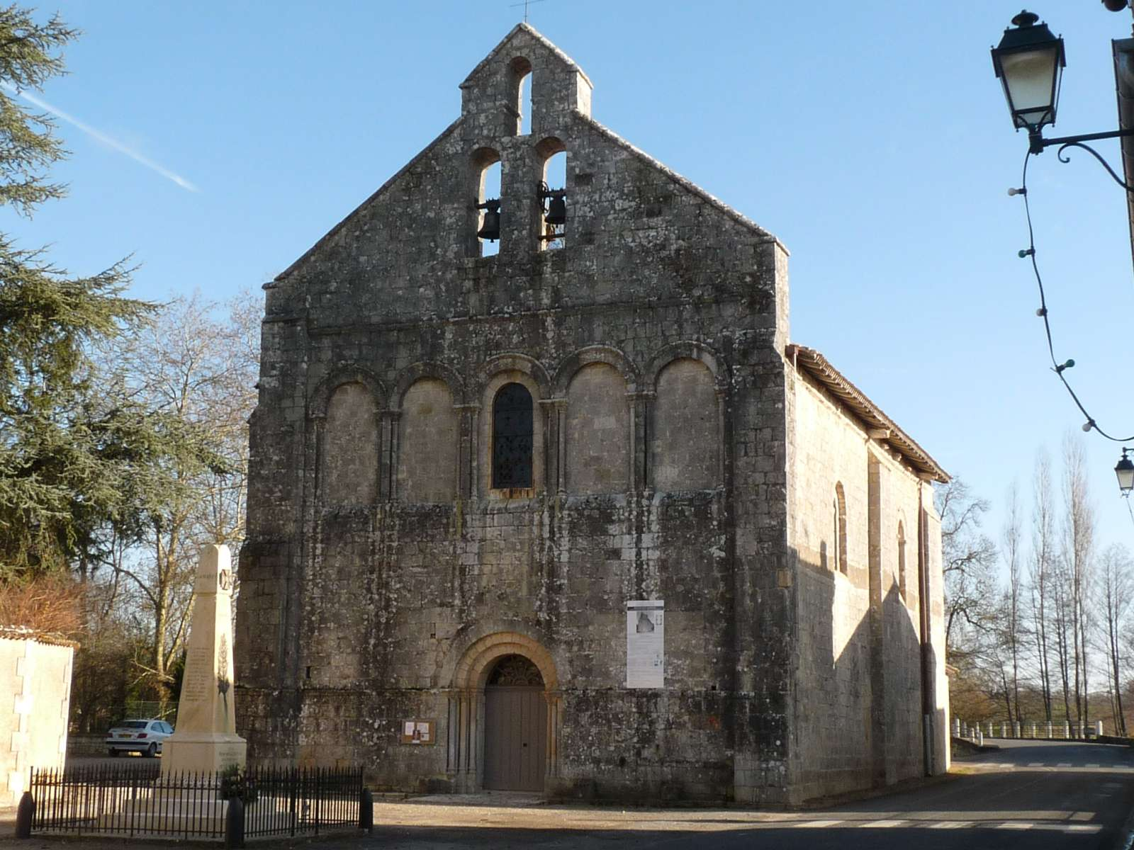 église de Feuillade, Charente, France